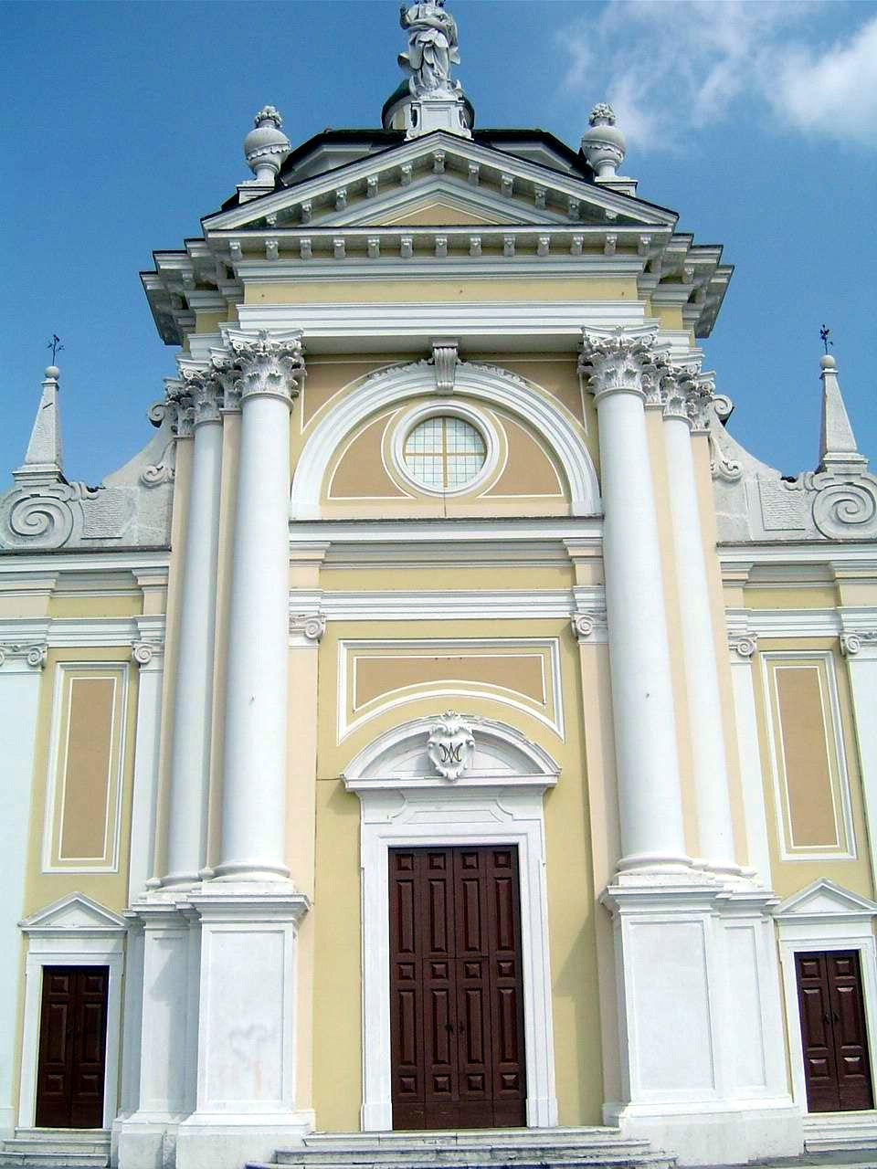 Facciata d'ingresso del Santuario della Madonna, sito in Carpenedolo